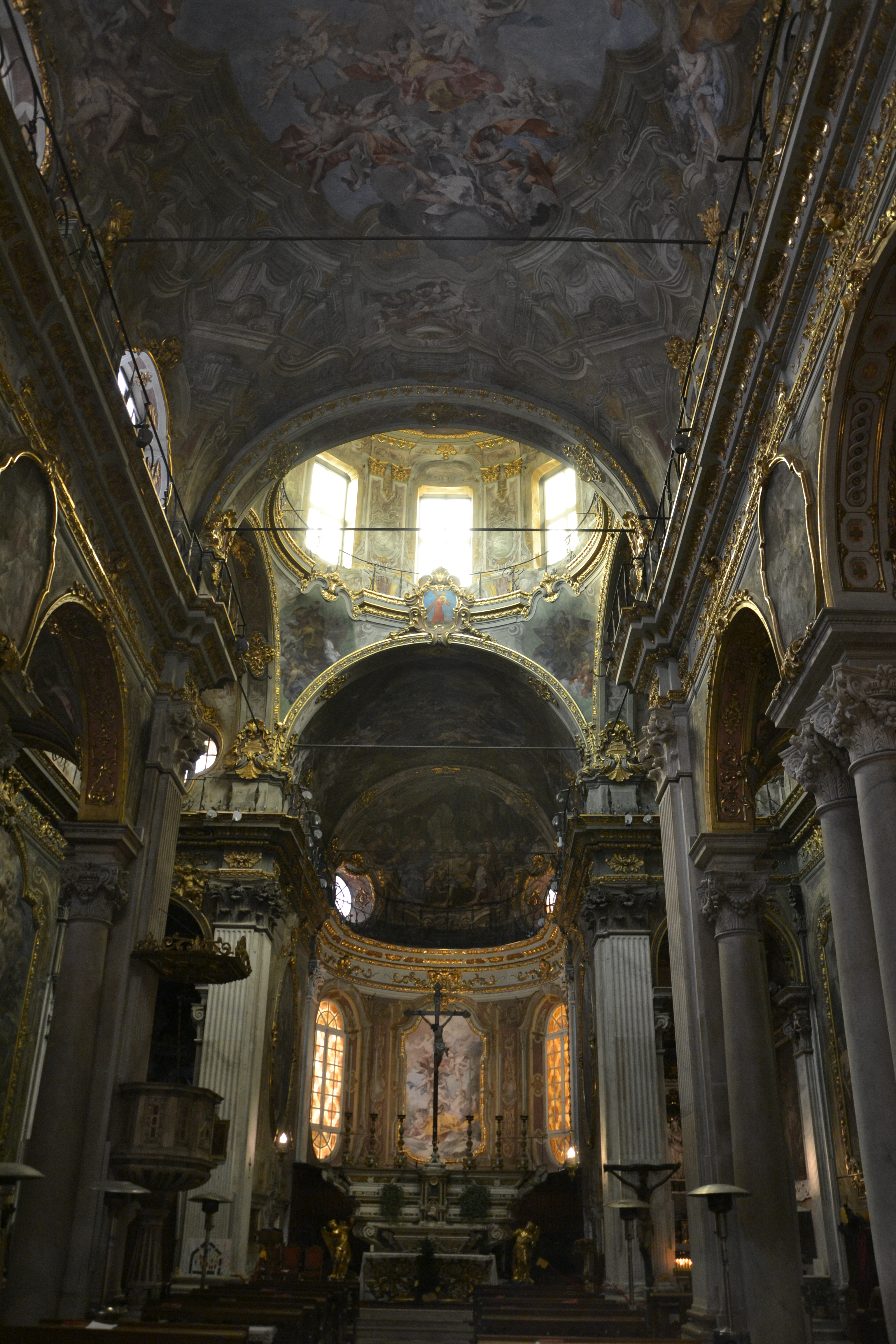 Santa Maria Maddalena (Genova), affeschi di Sebastiano Galeotti